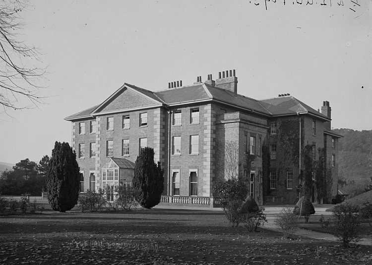 Ffotograffydd/Photographer: P B Abery (1877?-1948) Dyddiad/Date: [192-?] Cyfrwng/Medium: Negydd gwydr / Glass negative Maint/Dimensions: 119 x 163 mm. Cyfeiriad/Reference: PBA71/4 Rhif cofnod / Record no.: 4540493 Rhagor o wybodaeth am gasgliad P B Abery yn Llyfrgell Genedlaethol Cymru More information about the P B Abery Collection at the National Library of Wales